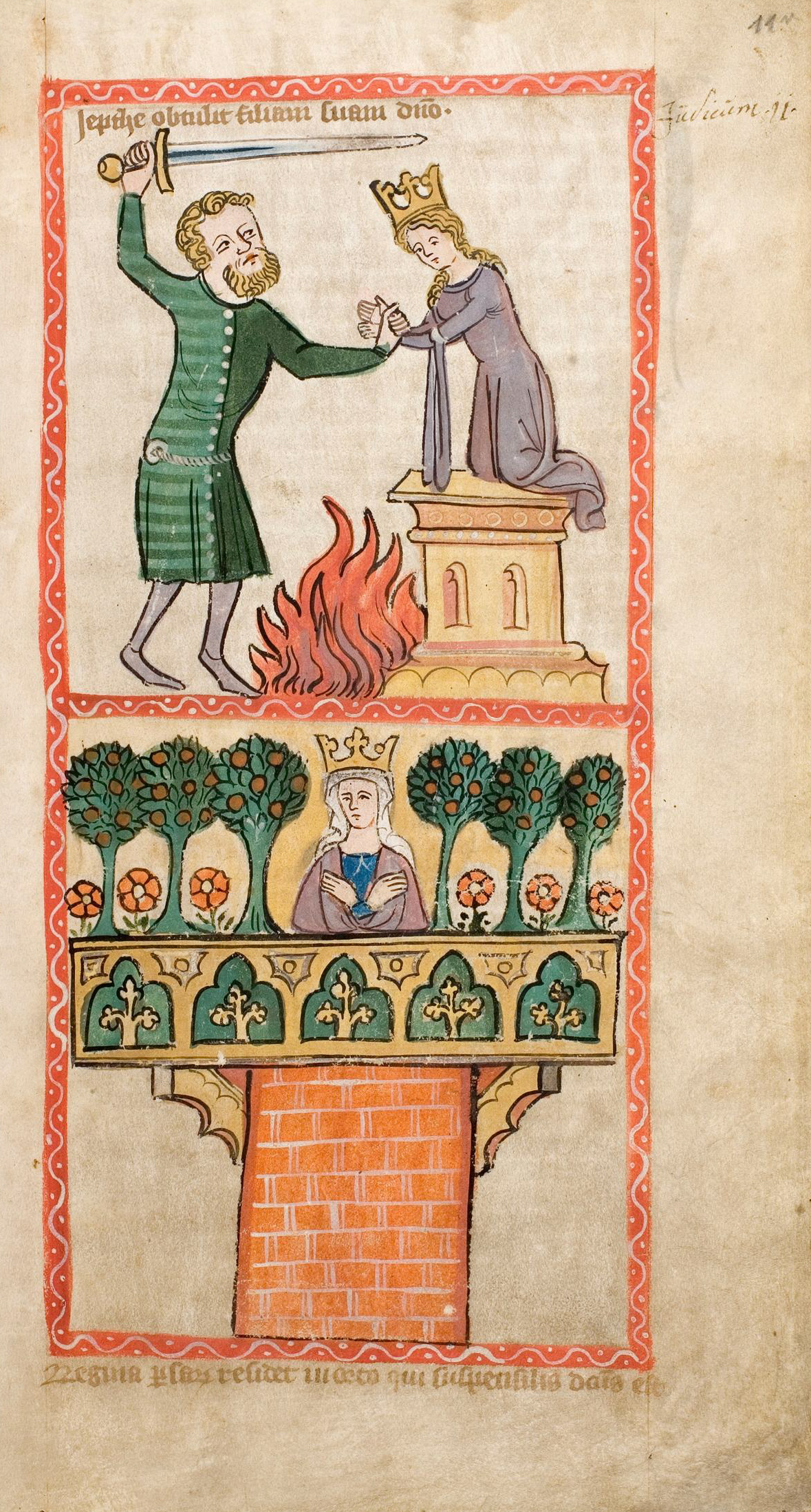 Speculum Humanae Salvationis, Westfalen oder Köln, um 1360. ULB Darmstadt, Hs 2505, fol. 11r